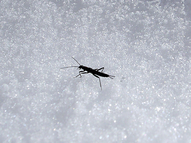 セッケイカワゲラ（長野県山ノ内町) Eocapnia nivalis (Nagano, JAPAN)